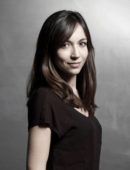 La escritora Isabel Garzo.